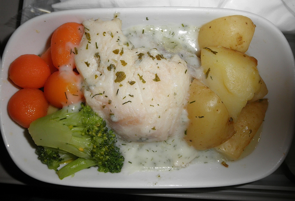 Fischfilet (in der Pfanne gebraten), nappiert mit Béchamelsauce, mit Kartoffel- und Gemüsebeilage.